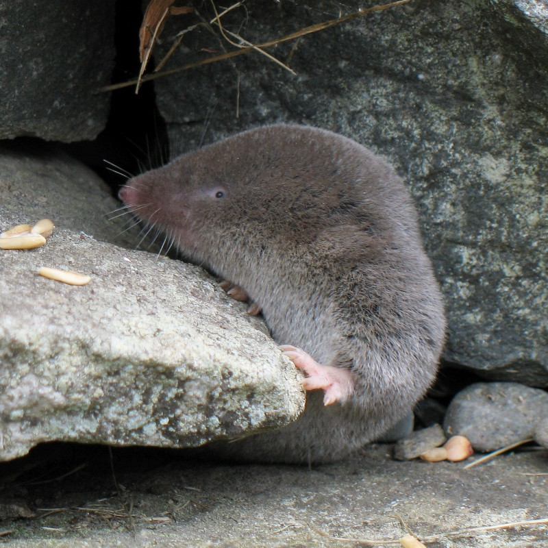 Blarina brevicauda -- Grande musaraigne -- Northern Short-tailed Shrew. Longueur / Length: approx. 10 cm (4 inches). North American mammal (order Insectivora). Mammifère nord-américain (ordre des insectivores). Bas-Saint-Laurent -- Province de Québec -- Canada